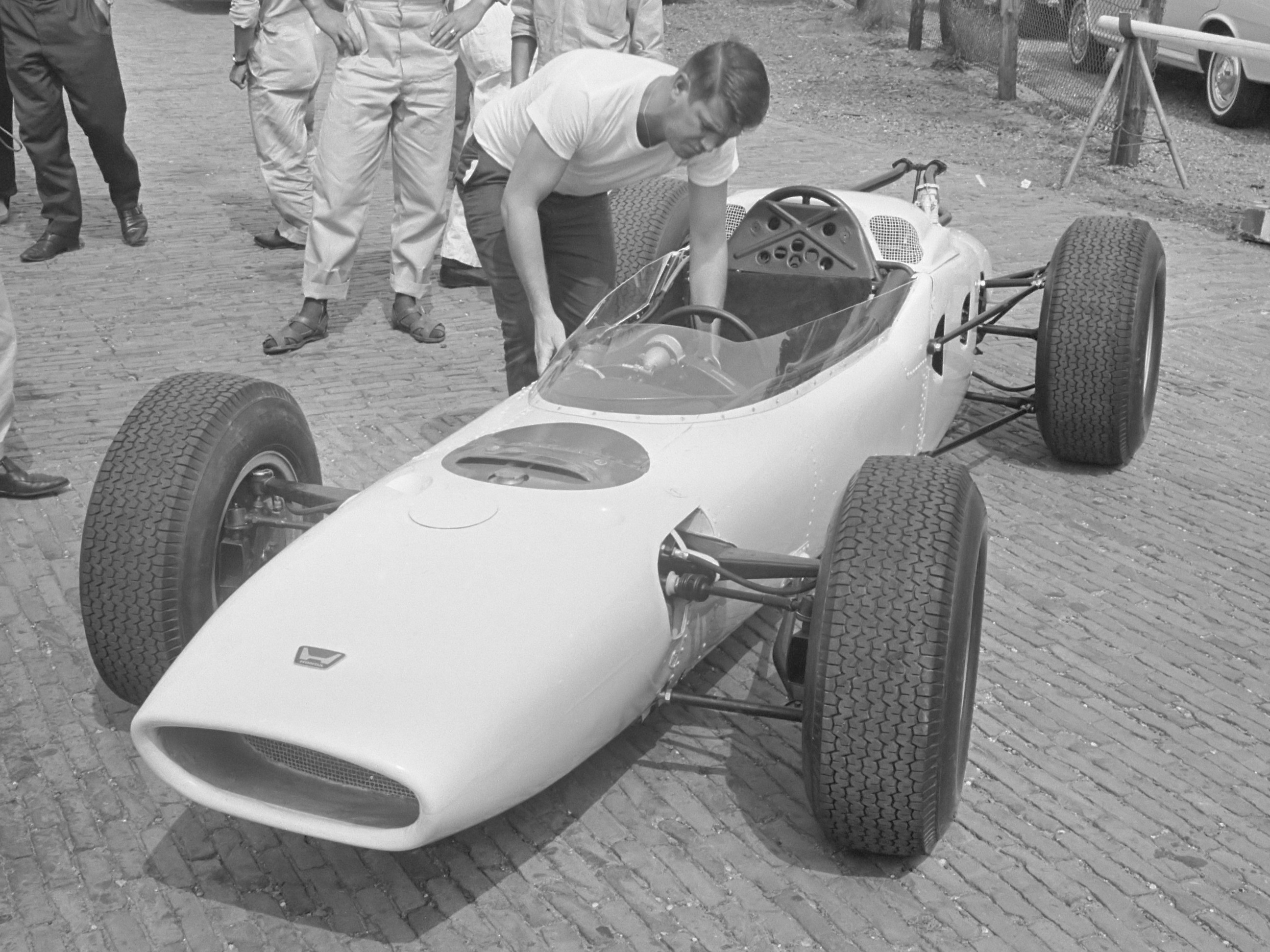 Autoprimeur op het Zandvoortse circuit, de Honda renwagen bereden door Ron Bucknum op het circuit 21 juli 1964